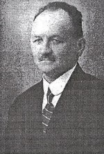 Marák Stanislav, český pedagog, básník, hudební skladatel, redaktor, publicista a politik